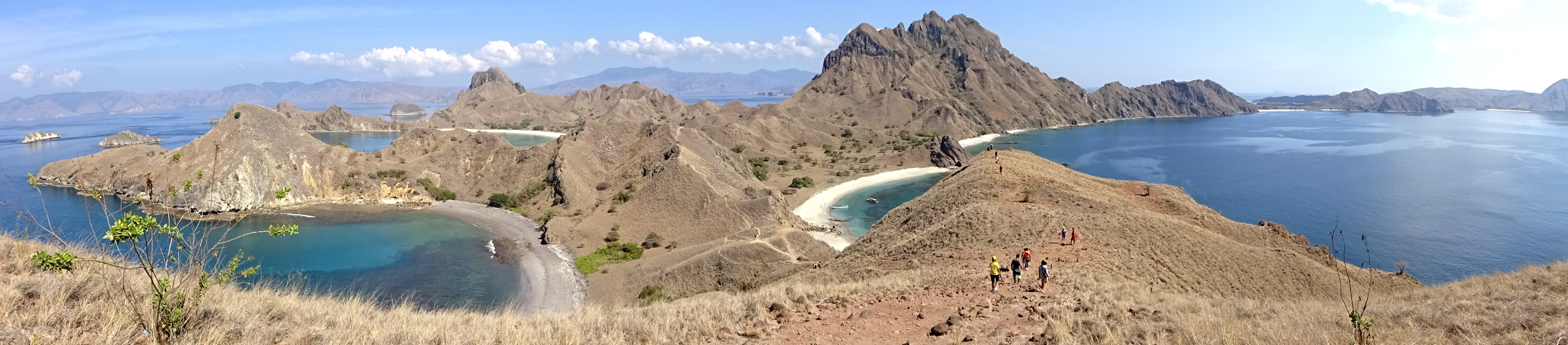 Pulau Padar adalah pulau ketiga terbesar di kawasan Taman Nasional Komodo, setelah Pulau Komodo dan Pulau Rinca. Bentuknya yang memanjang dengan titik tertingginya di ujung utara, maka dari puncak bukit akan terlihat bentuk Padar yang berkontur unik dari ketinggian. Dibingkai pantai berbasir putih di setiap lekukannya dan julangan pulau-pulau sabana di sekitarnya.